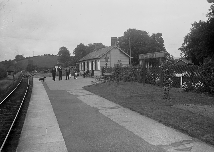 Ffotograffydd/Photographer: P B Abery (1877?-1948) Dyddiad/Date: [193-?] Cyfrwng/Medium: Negyddion gwydr / Glass negatives Maint/Dimensions: 119 x 163 mm. Cyfeiriad/Reference:PBA22/2 Rhif cofnod / Record no.: 4508364 Rhagor o wybodaeth am gasgliad P B Abery yn Llyfrgell Genedlaethol Cymru More information about the P B Abery Collection at the National Library of Wales